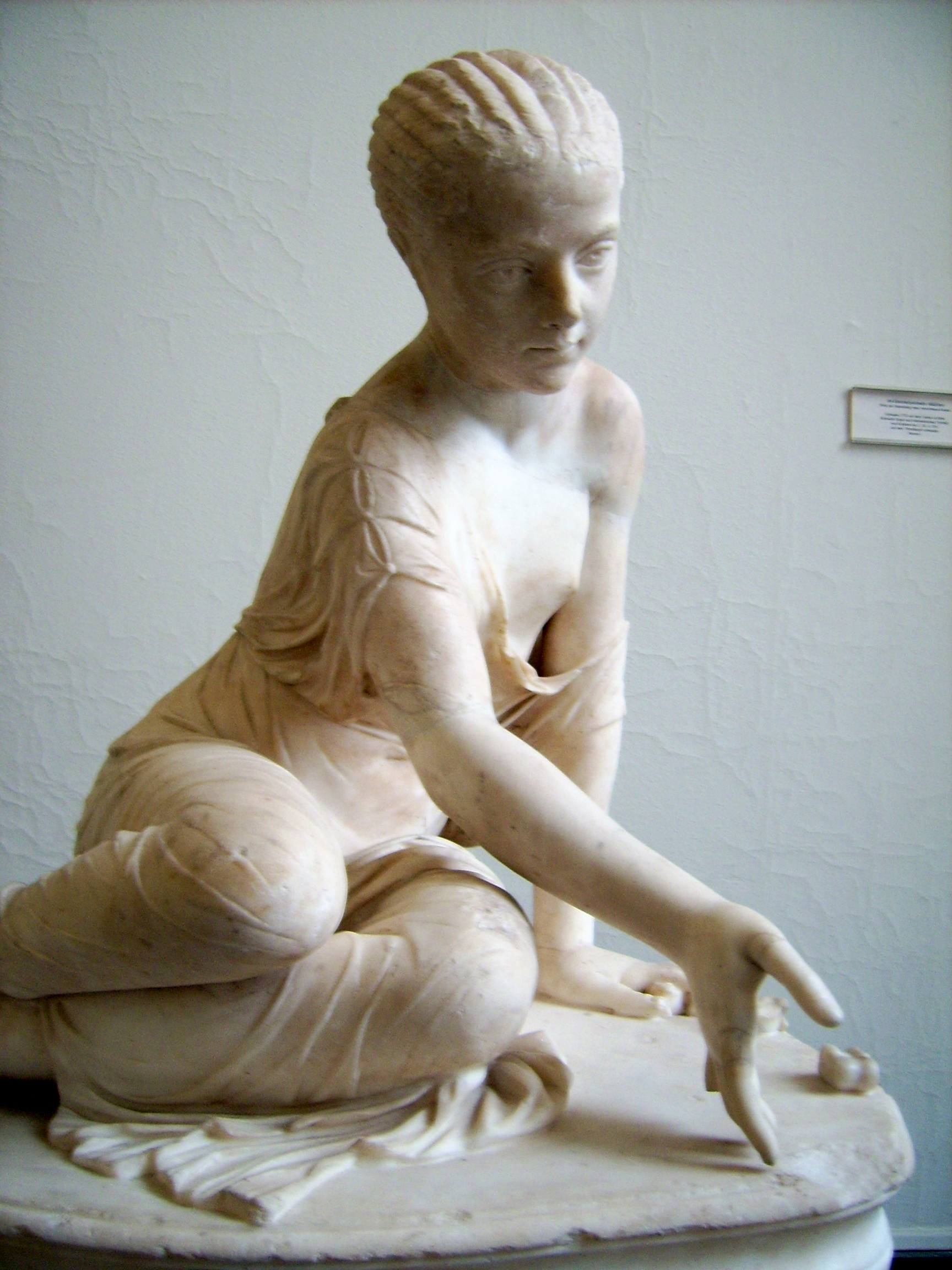 Knöchelspielerin in der Antikensammlung Berlin/Pergamonmuseum (Sk 494/R 75), 1730 auf dem Caelius in Rom gefunden, Ende des 2. Jahrhunderts, römische Kopie nach hellenistischen Vorbild, Marmor, Höhe 70 cm